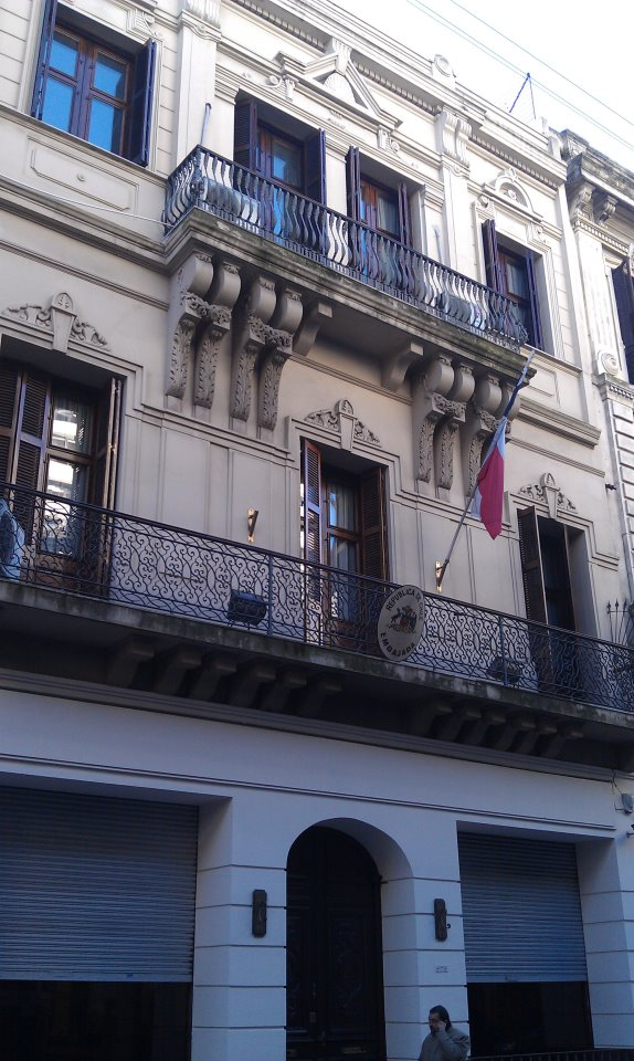 Edificio de la Embajada de Chile en Uruguay